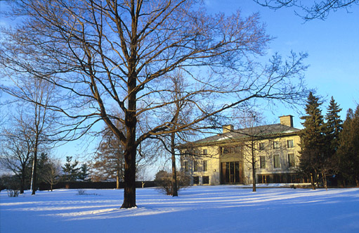 Résidence d'hiver de l'ambassadeur de France au Canada.